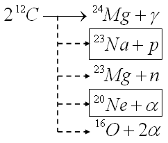 Creación propia